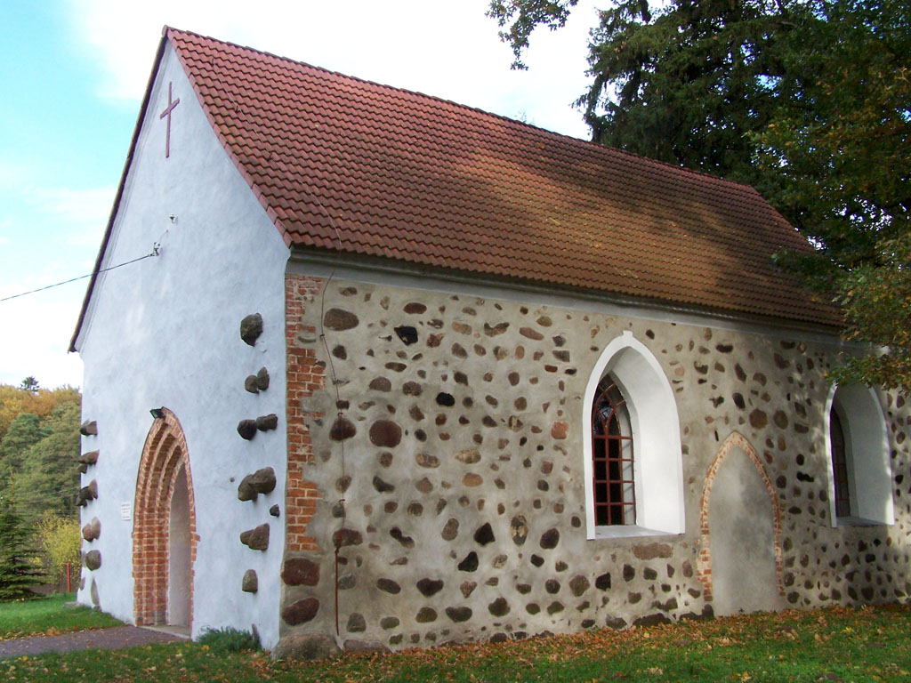 Budzieszowce - rzymskokatolicki kościół filialny p.w. Macierzyństwa NMP, kon. XV 06.1956.